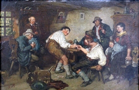 Ölgemälde von Joseph Machold mit Darstellung des Fingerhakelns.